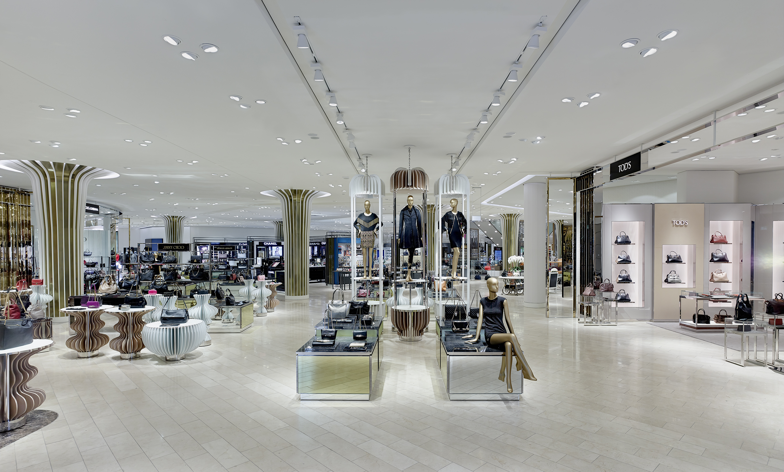 Торговый дом "Бройнингер", г. Дюссельдорф, отдел эксклюзивных сумок